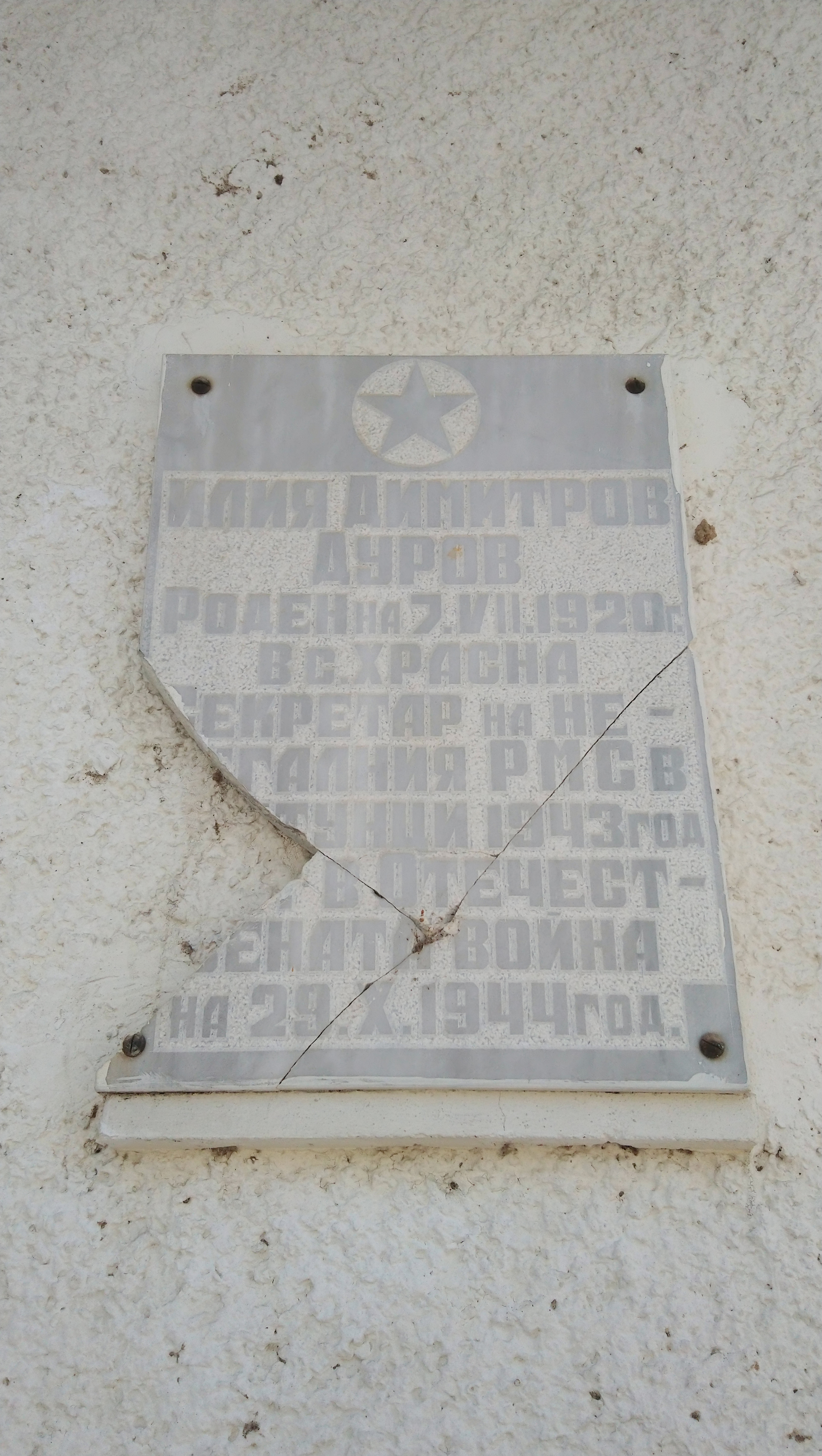 Паметна плоча на стената на читалище Просвета 1935, село Катунци